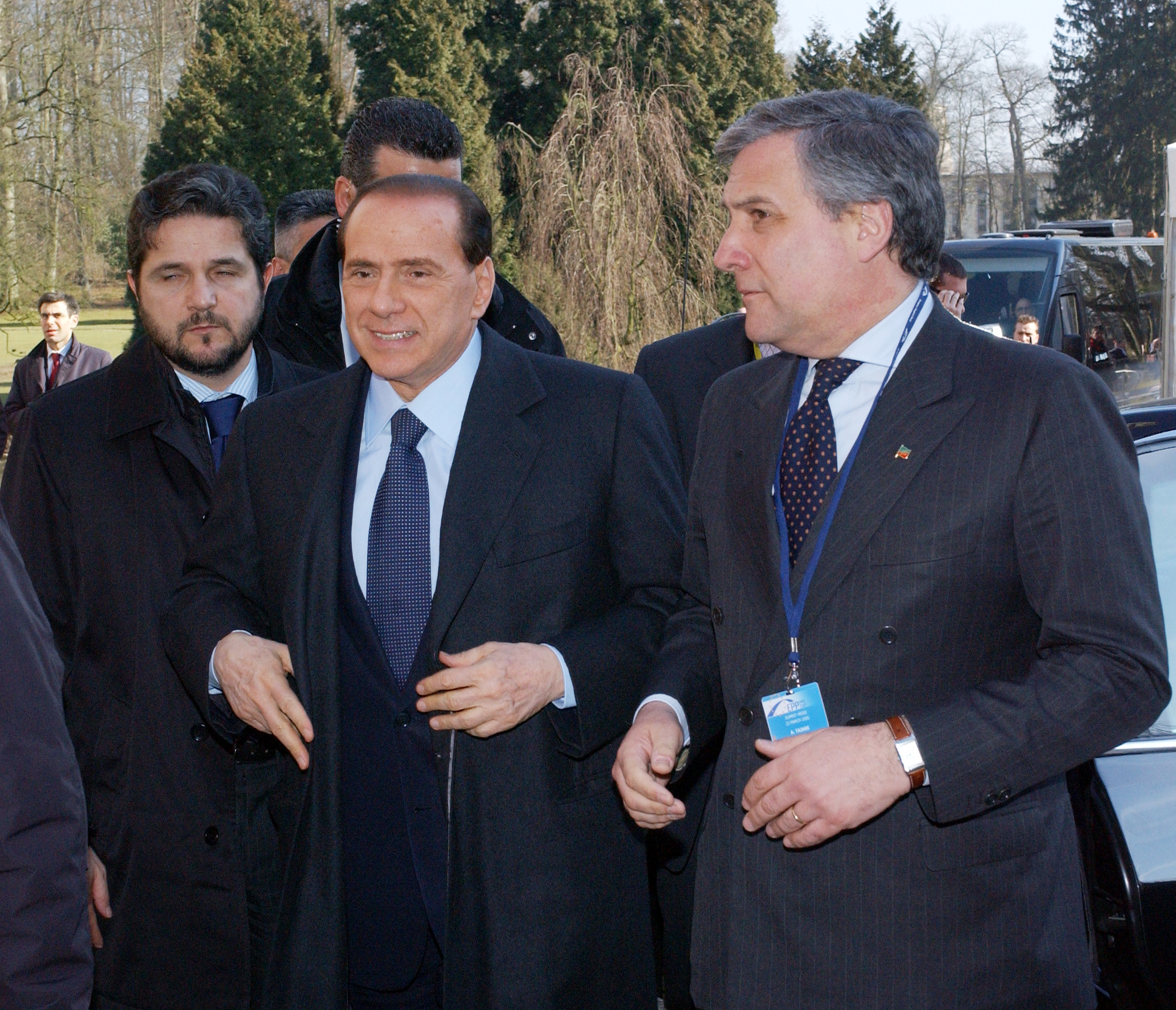 EPP Summit 23 March 2006